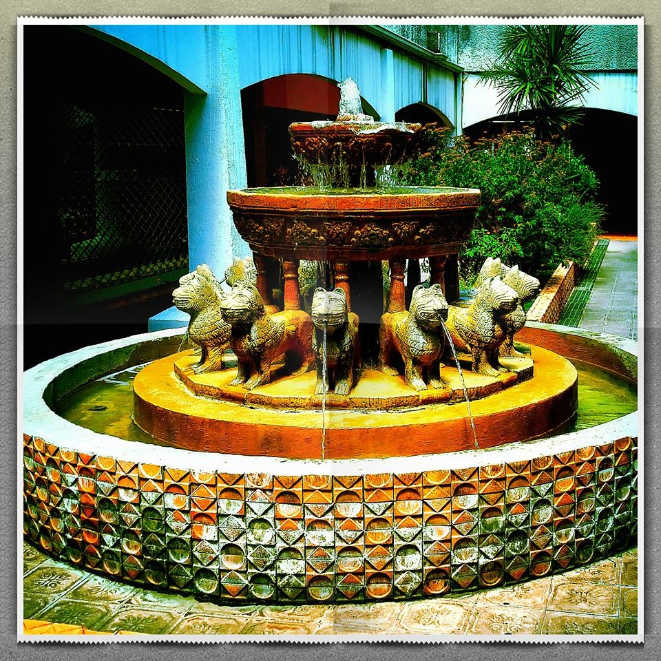 La fontaine de l'Alhambra à Tarbes est située dans une galerie commerciale à ciel ouvert, au 43 rue Maréchal Foch. C'est une réplique de la fontaine Alhambra située à Grenade en Espagne. Ouverte au public.